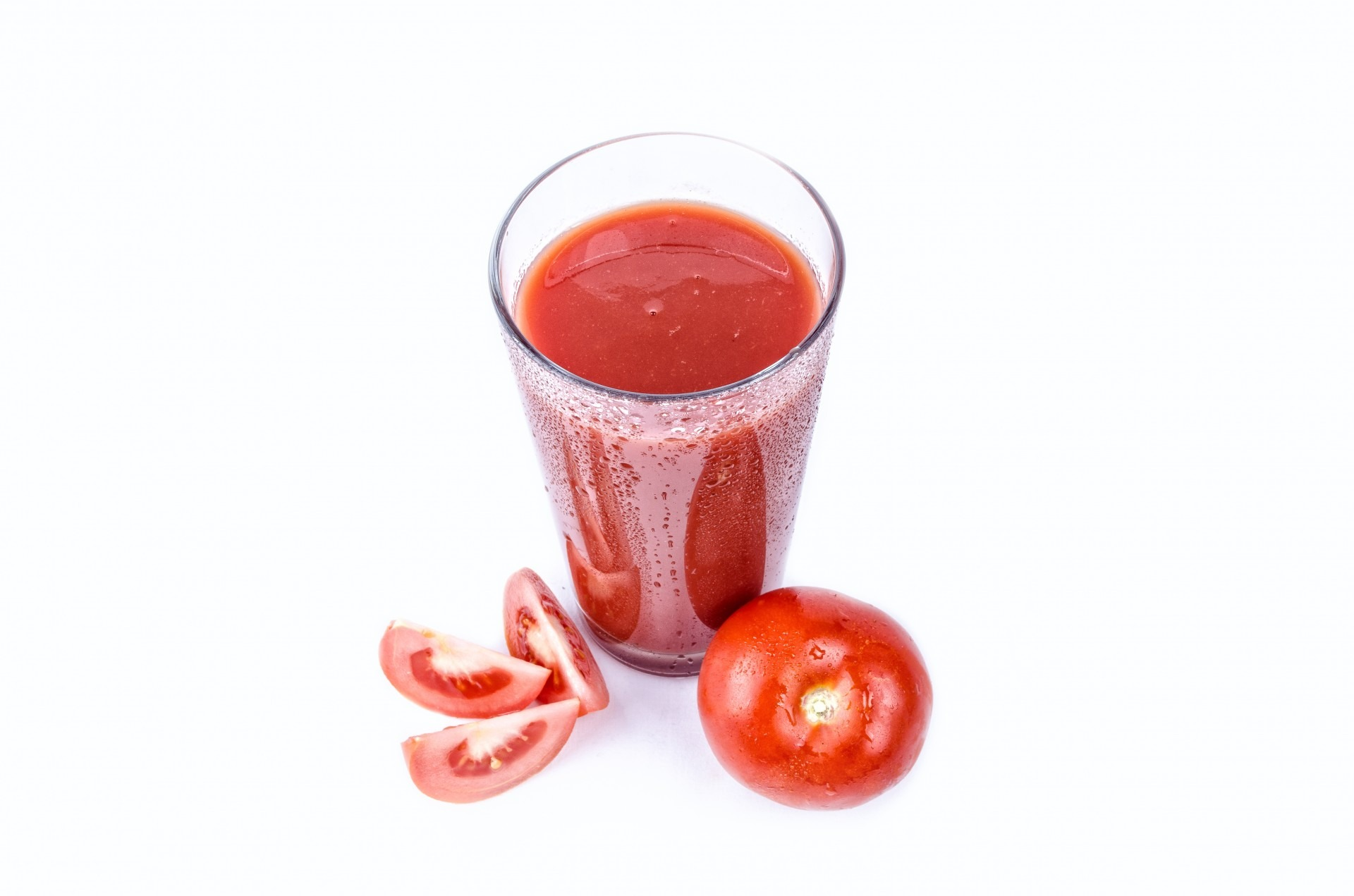 Jus de tomate